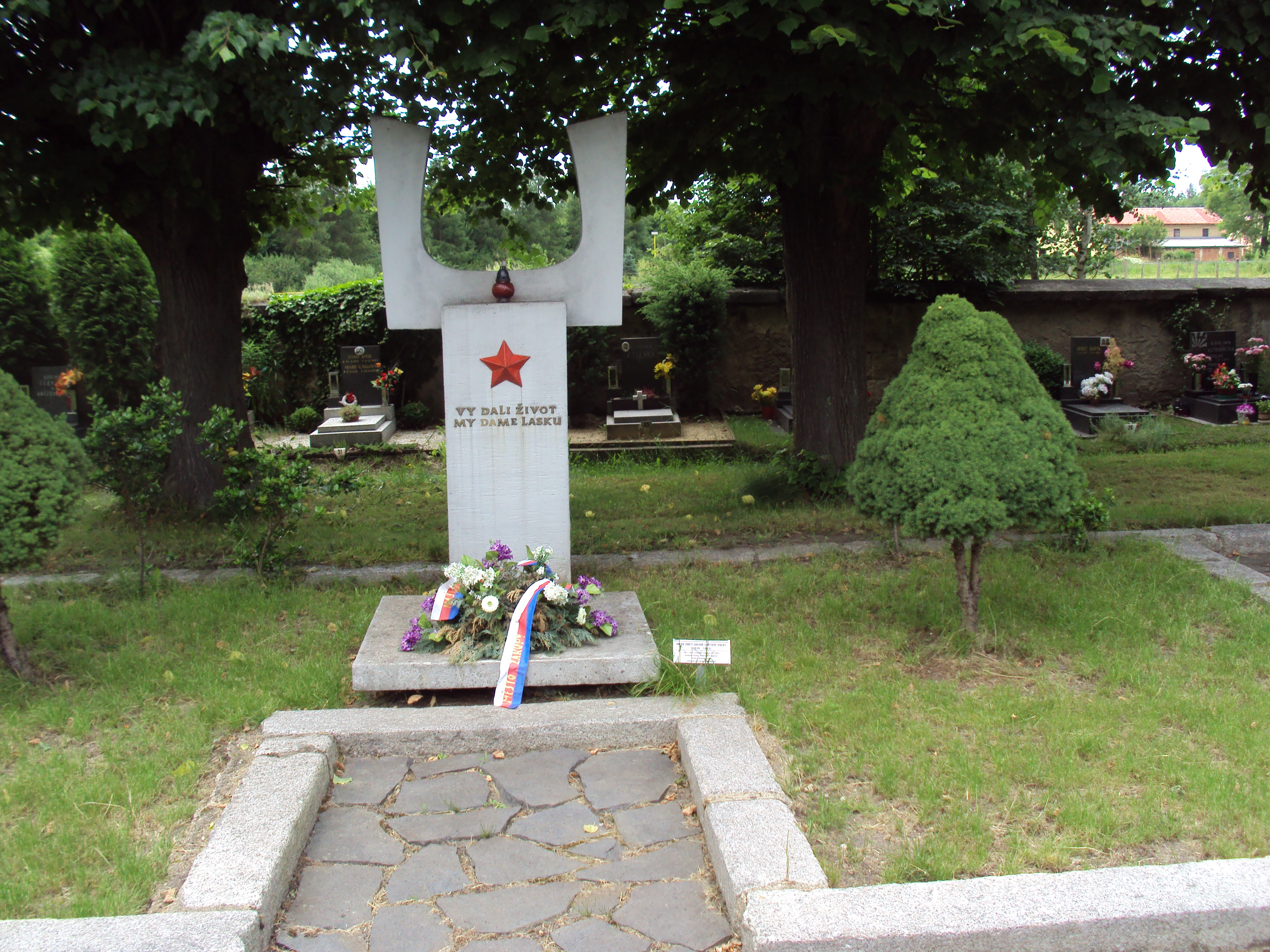 Hrob obětí II.sv.války na hřbitově v Zákupech